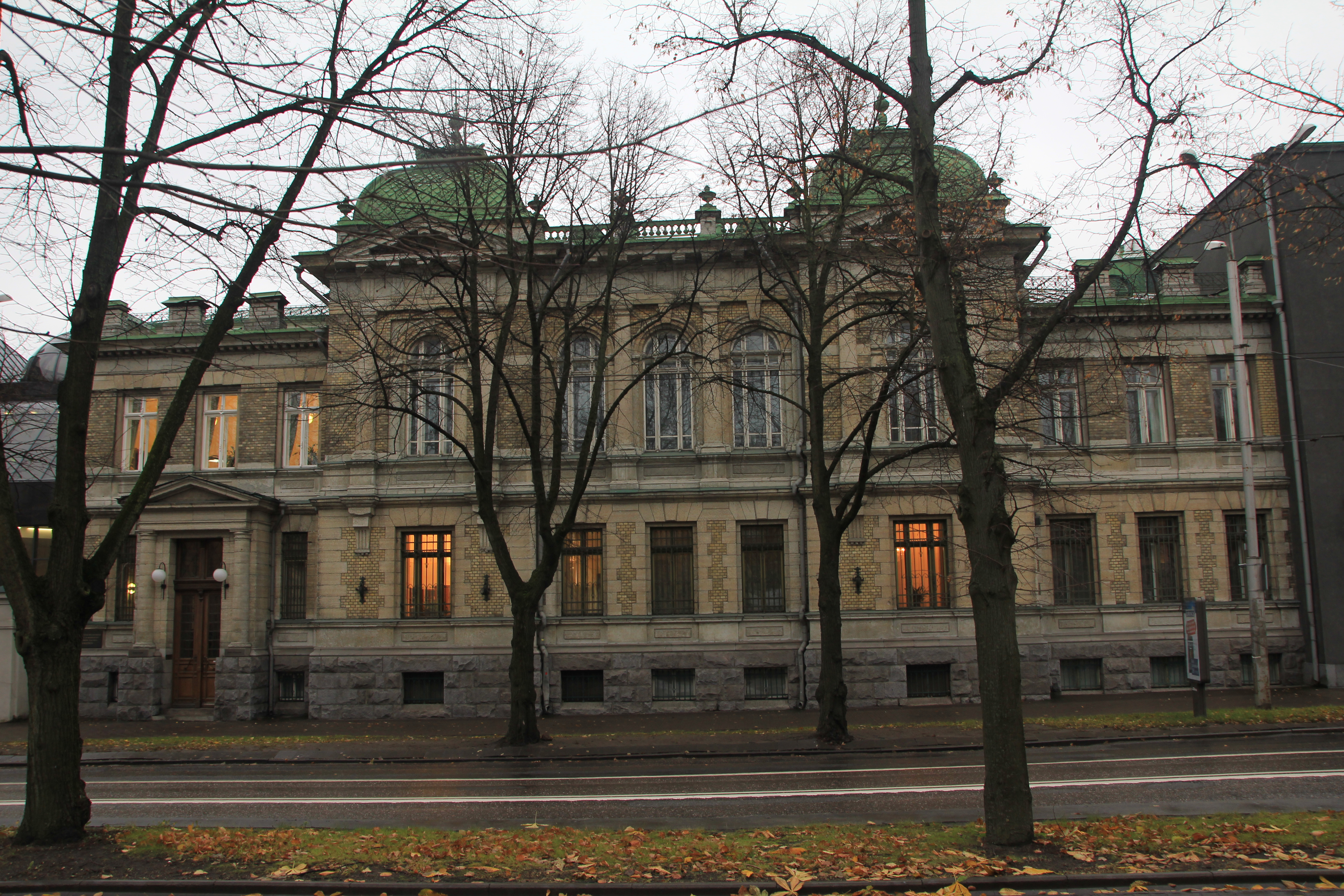 Endine Vene Riigipanga Reveli kontori hoone. Hoone valmis 1909, arhitekt Aleksander Jaron. Selles hoones moodustati 24. veebruaril 1918 Eesti Ajutine Valitsus. Kuni 1935. aastani oli see maja Eesti Panga peahoone, taas Eesti Panga kasutuses aastast 1992.